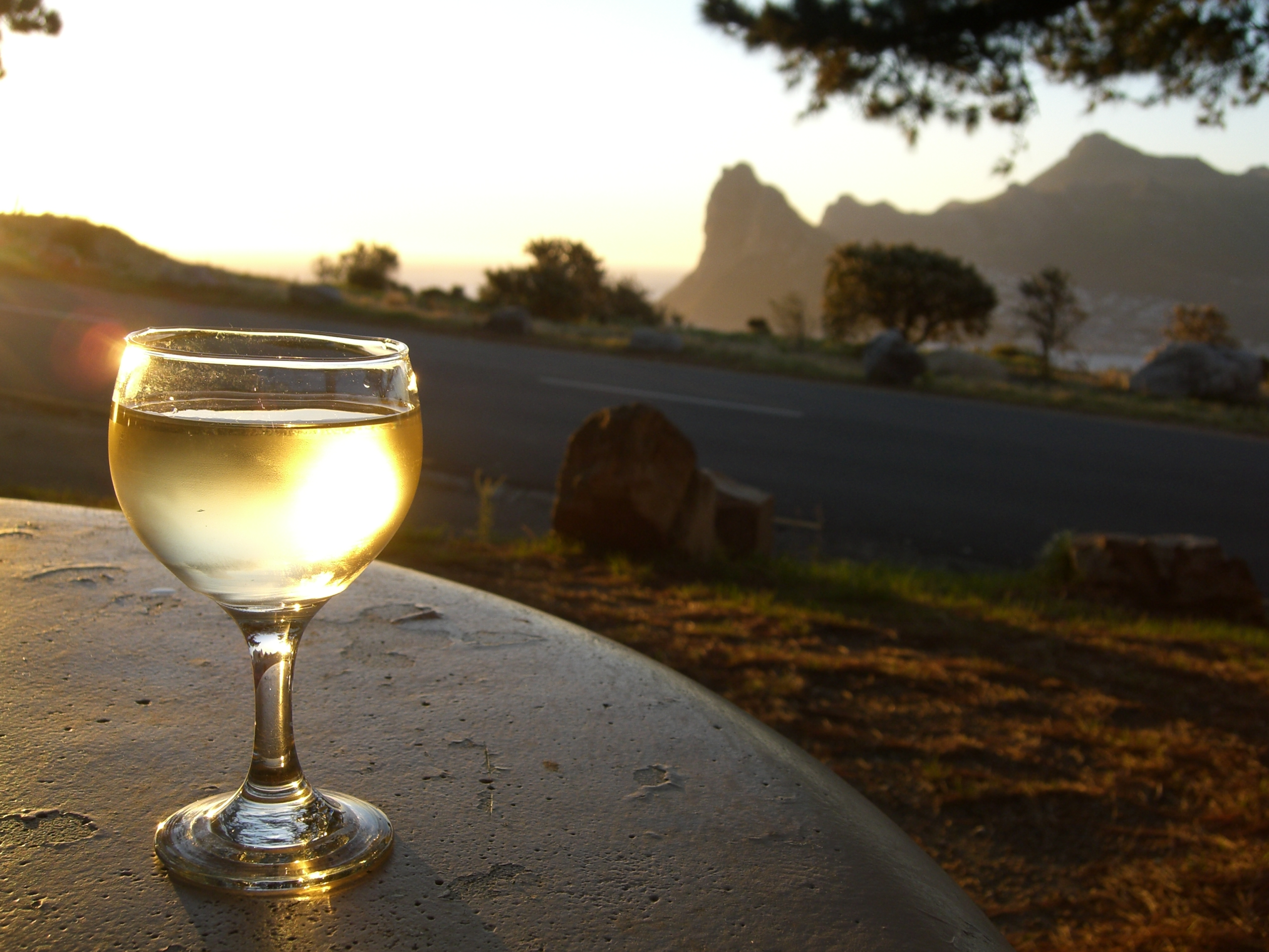 Im Fokus: Weißwein mit perfekter Temperatur (wird deutlich durch die Kondensation der Luftfeuchte am Glas). Im Hintergrund: Küste von Südafrika